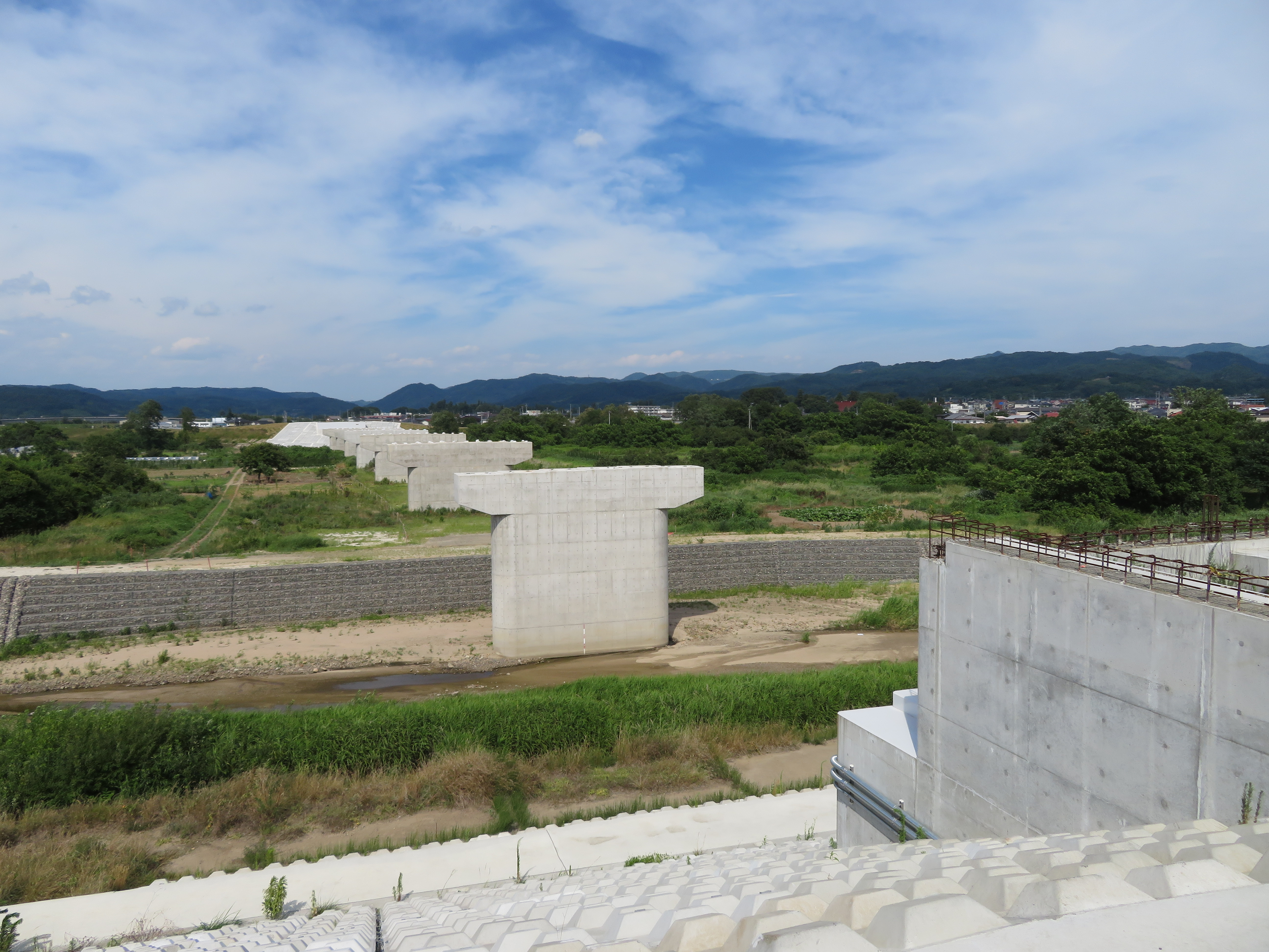 福島県伊達市に建設中の広瀬大橋（仮称）の橋脚及び橋台 Canon PowerShot SX720 HS